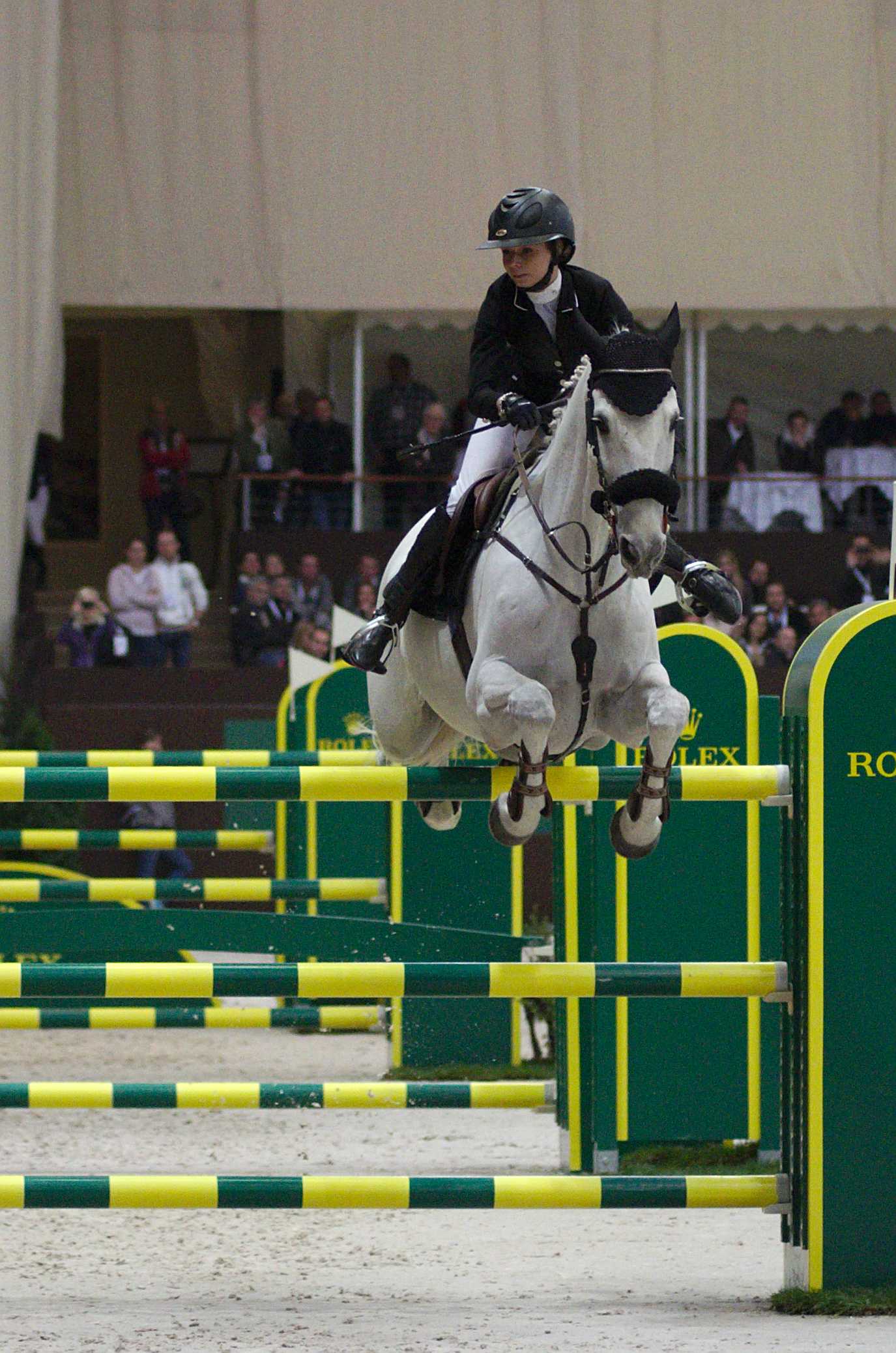 54eme CHI de Genève - 20141213 - Coupe de Genève - Anna-Julia Kontio et Fardon